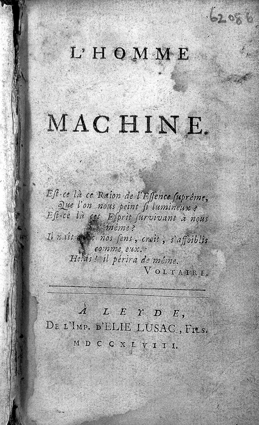 Title page Rare Books Keywords: Julien Offray de La Mettrie